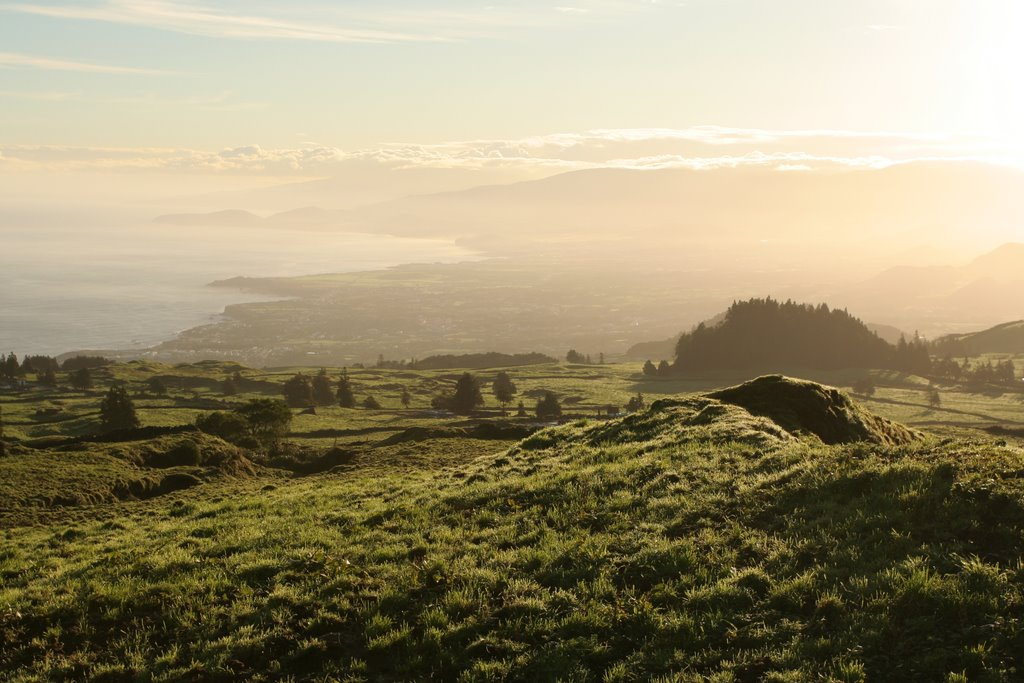 Picture 170